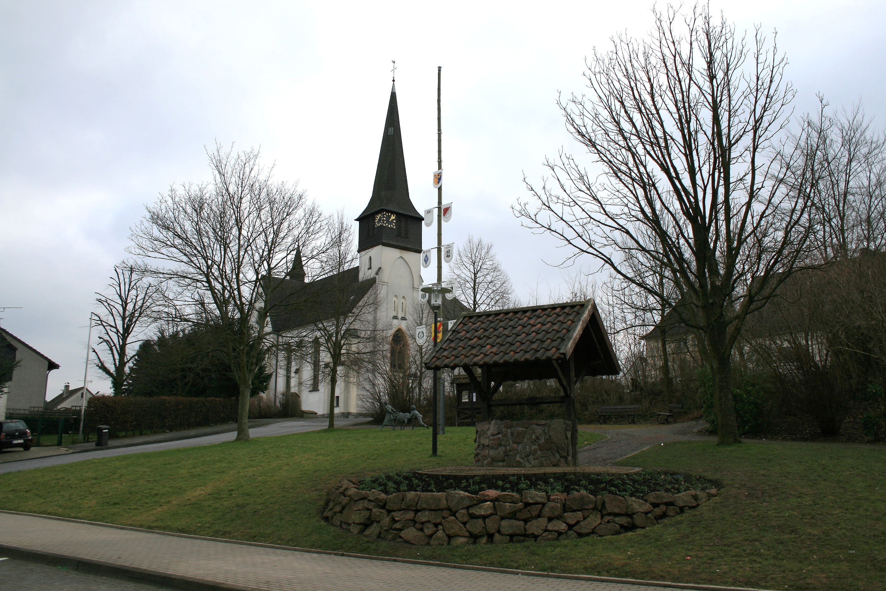 Dorfplatz mit St. Vinzenz""-Kirche, Dorfbrunnen und Maibaum im Ortsteil Echthausen der Gemeinde Wickede (Ruhr).